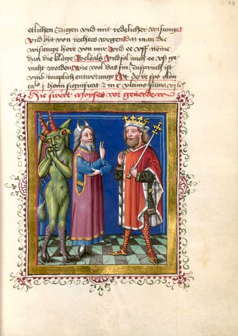 Bélial-Moïse-et-Salomon1